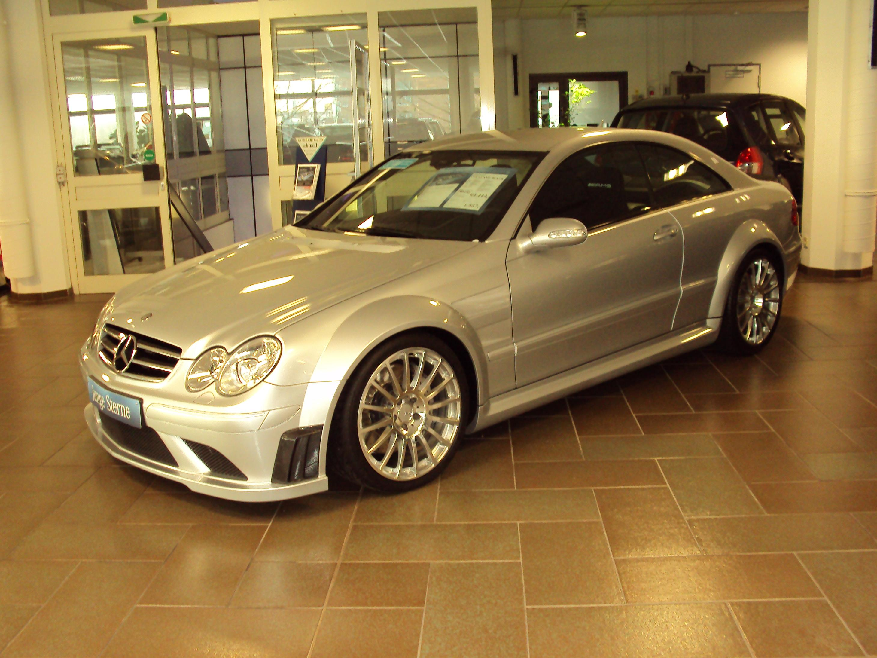 Mercedes-Benz CLK 63 AMG Black Series